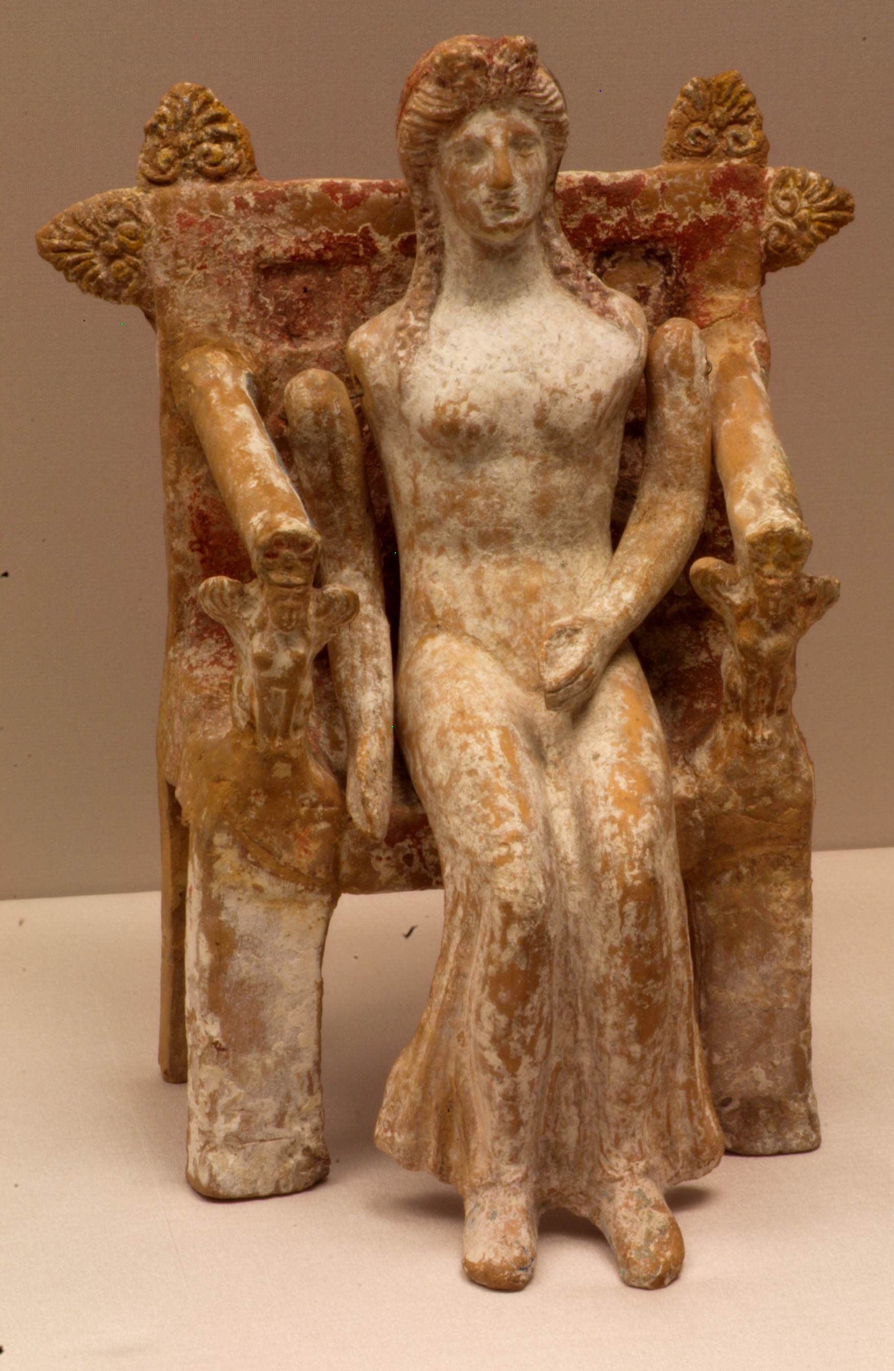 Terrakottafigur einer Göttin auf einem Thron. DIe Arme waren beweglich angeordnet. Da die Puppe ursprünglich bekleidet war, sind die Gewandfalten nur angedeutet. Theben 4.Jhdt Chr